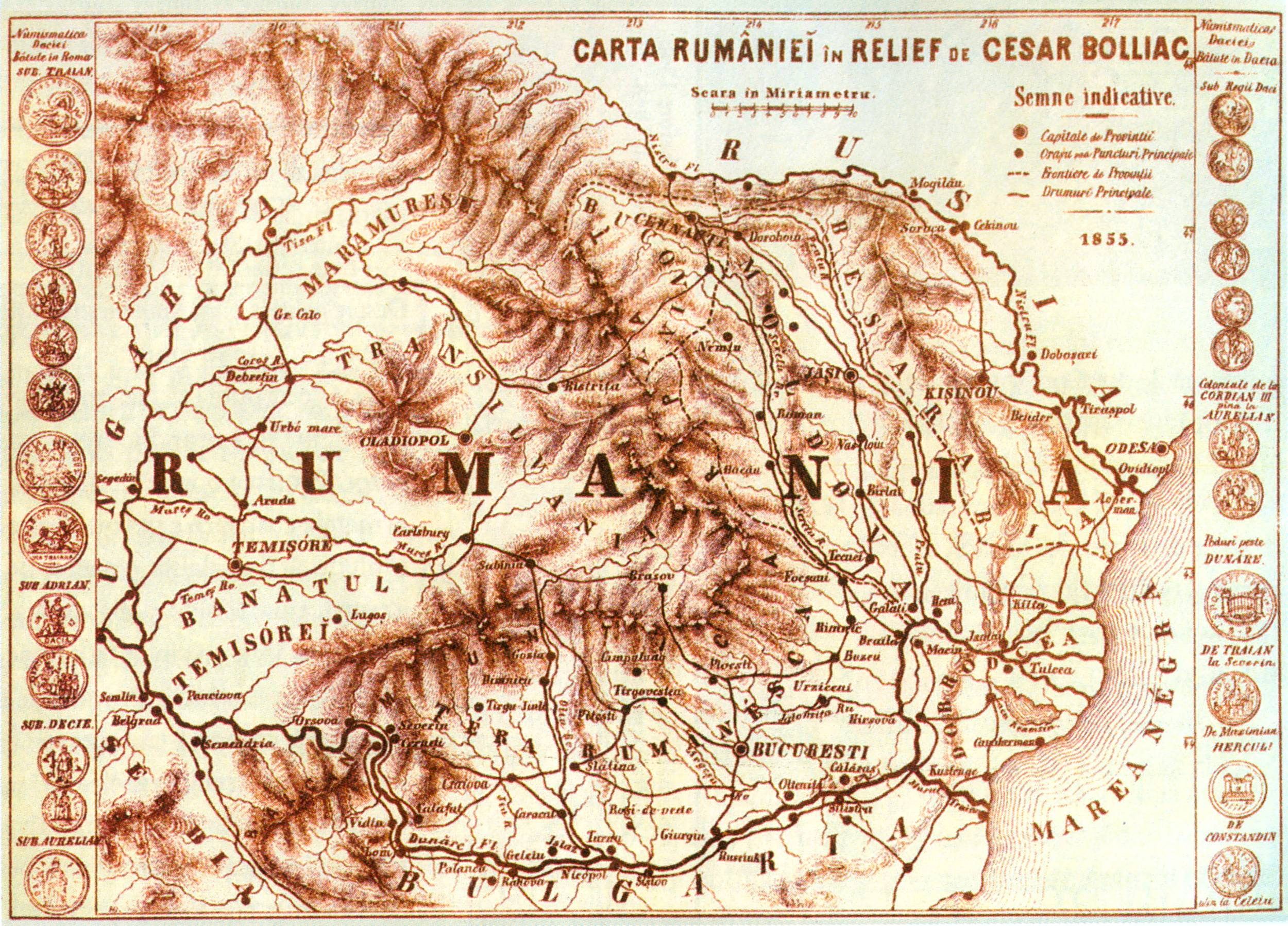 Titlul original: Carta Rumâniei în relief. Litografie: imprimeria "G. Wonneberg" din Bucureşti. Anul apartiţiei: 1855 sau la scurt timp dupa această dată. Lucrarea a fost retipărită în Bucureşti în anul 1923.